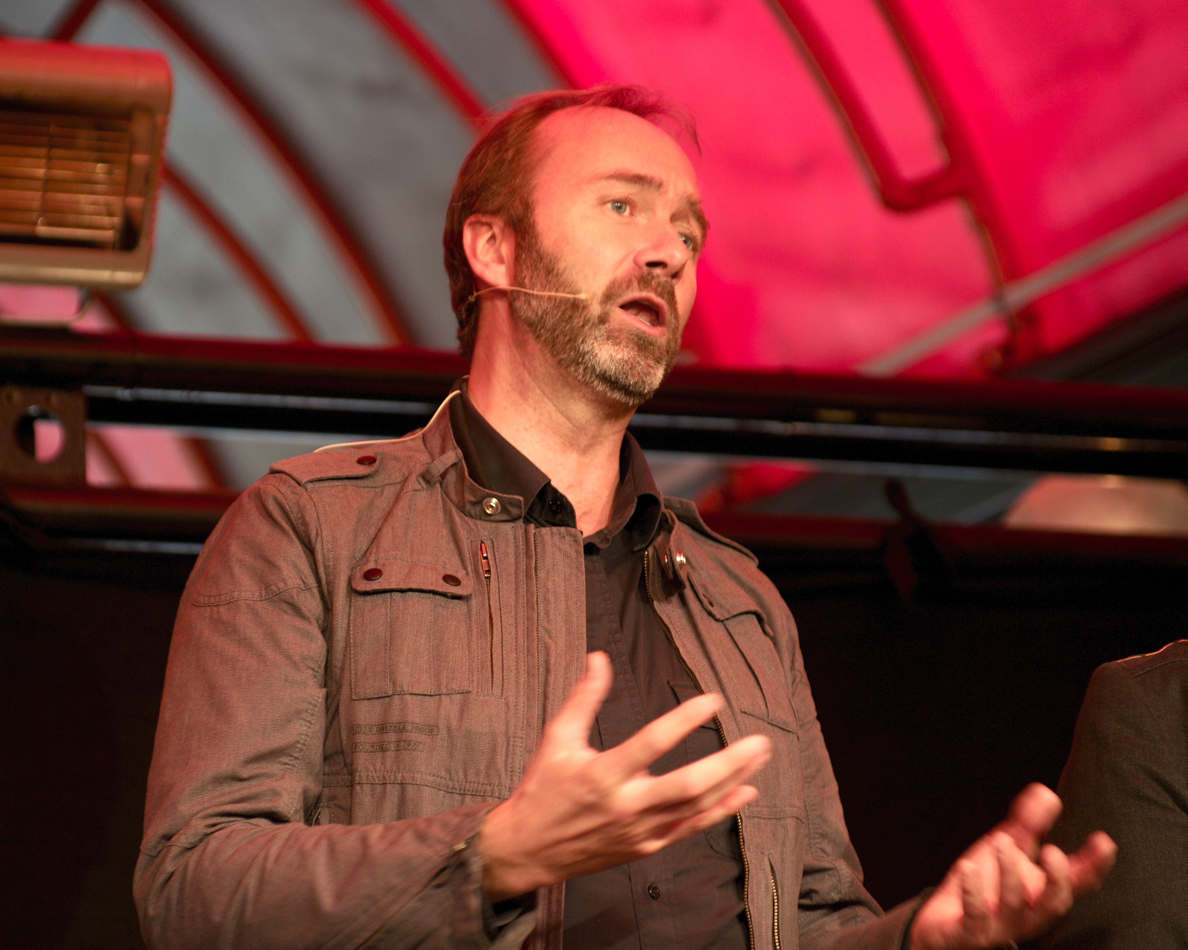 Trond Giske at Oslo bokfestival 2012.